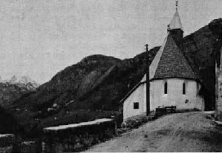 Strmec na Predelu